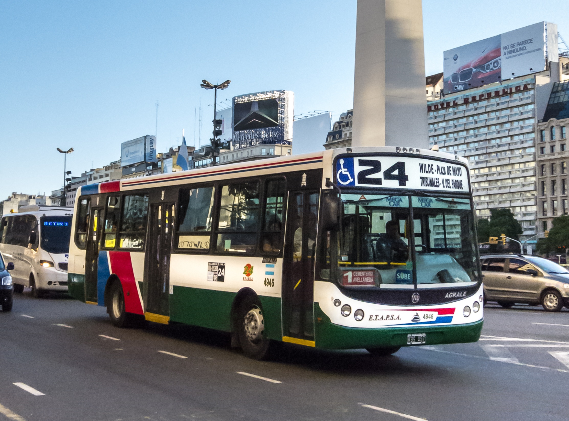 Colectivo de la Línea 24, interno 4946, carrocería Todo Bus, chasis Agrale MT 15, matrícula KBS497. Buenos Aires, Argentina.